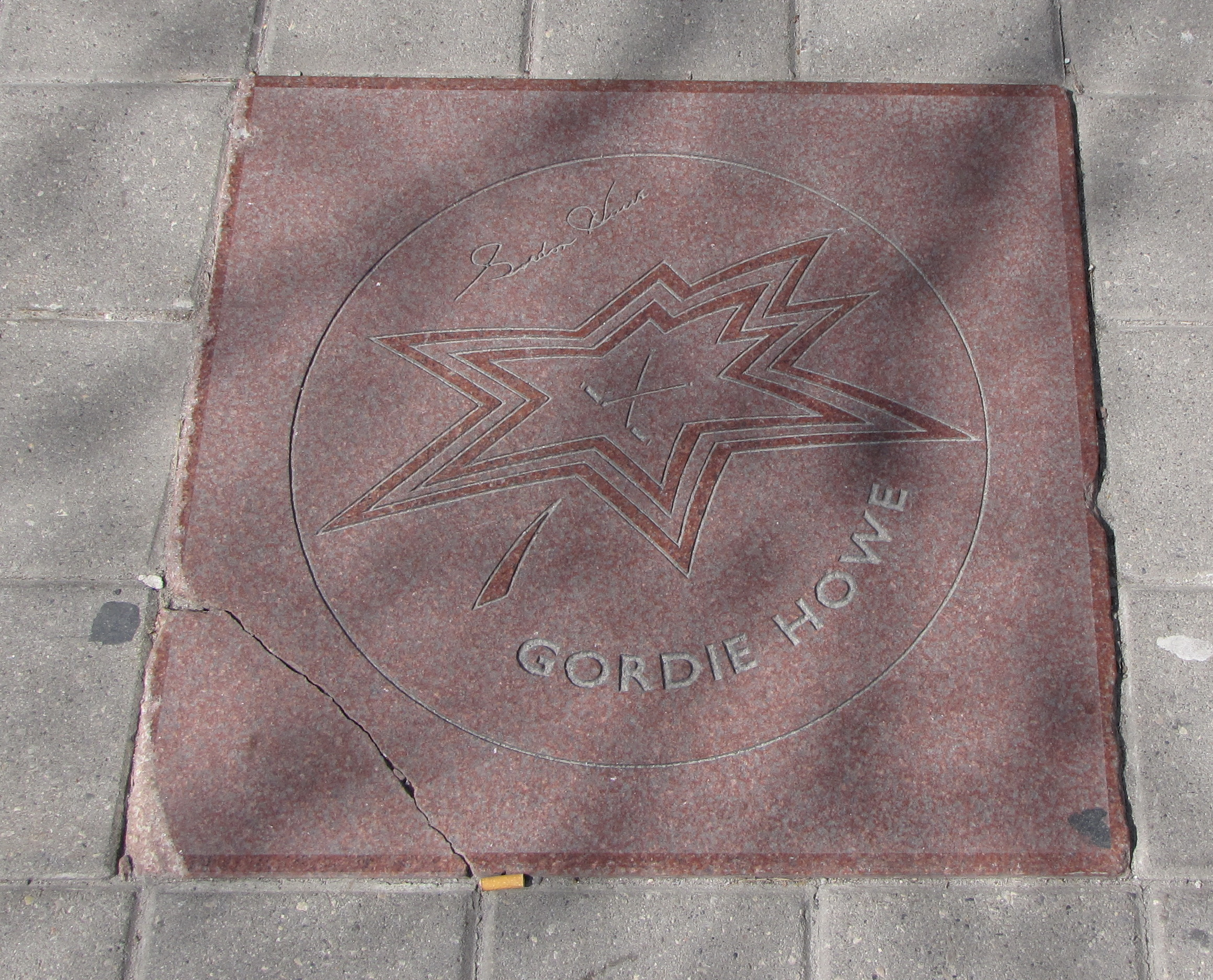 Gordie Howe's star on Canada's Walk of Fame